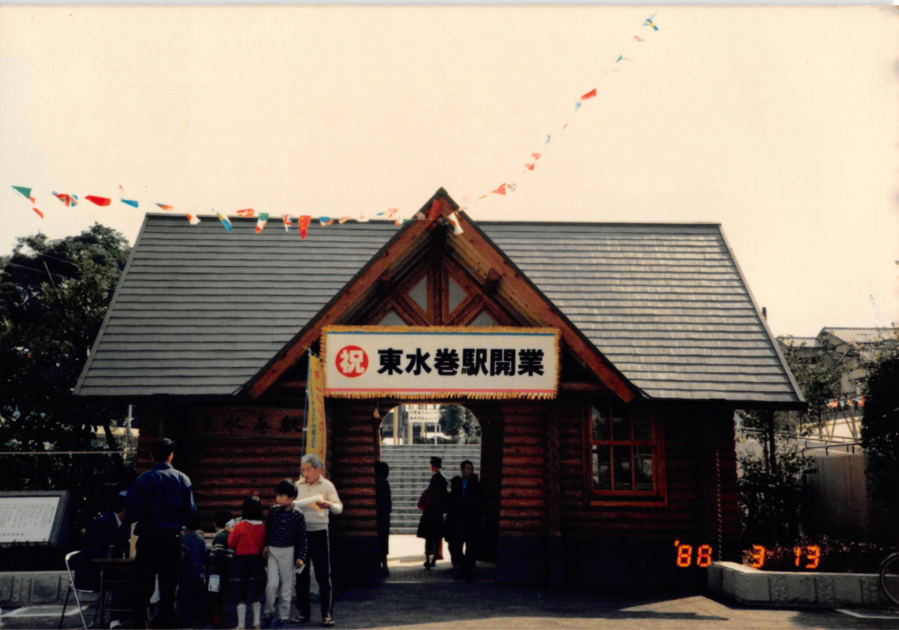 東水巻駅開業日の様子